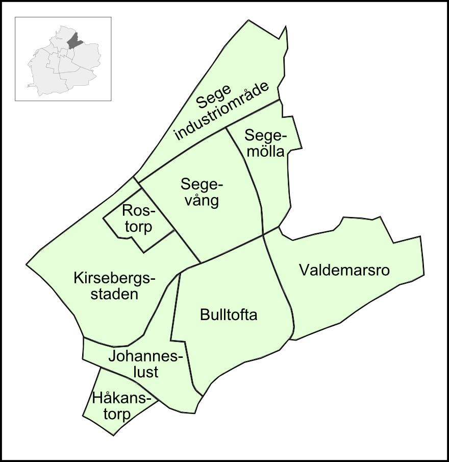 Delområdena i Kirseberg, Malmö, 2009.